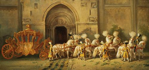 Krönungswagen mit Imperialzug vor dem Riesentor der Stephanskirche in Wien. Anmerkungen:Das Bild stammt aus dem Besitz des Oberststallmeisteramtes und wurde 1922 anlässlich der Auflösung des Hofstalles dem Kunsthistorischen Museum übergeben.